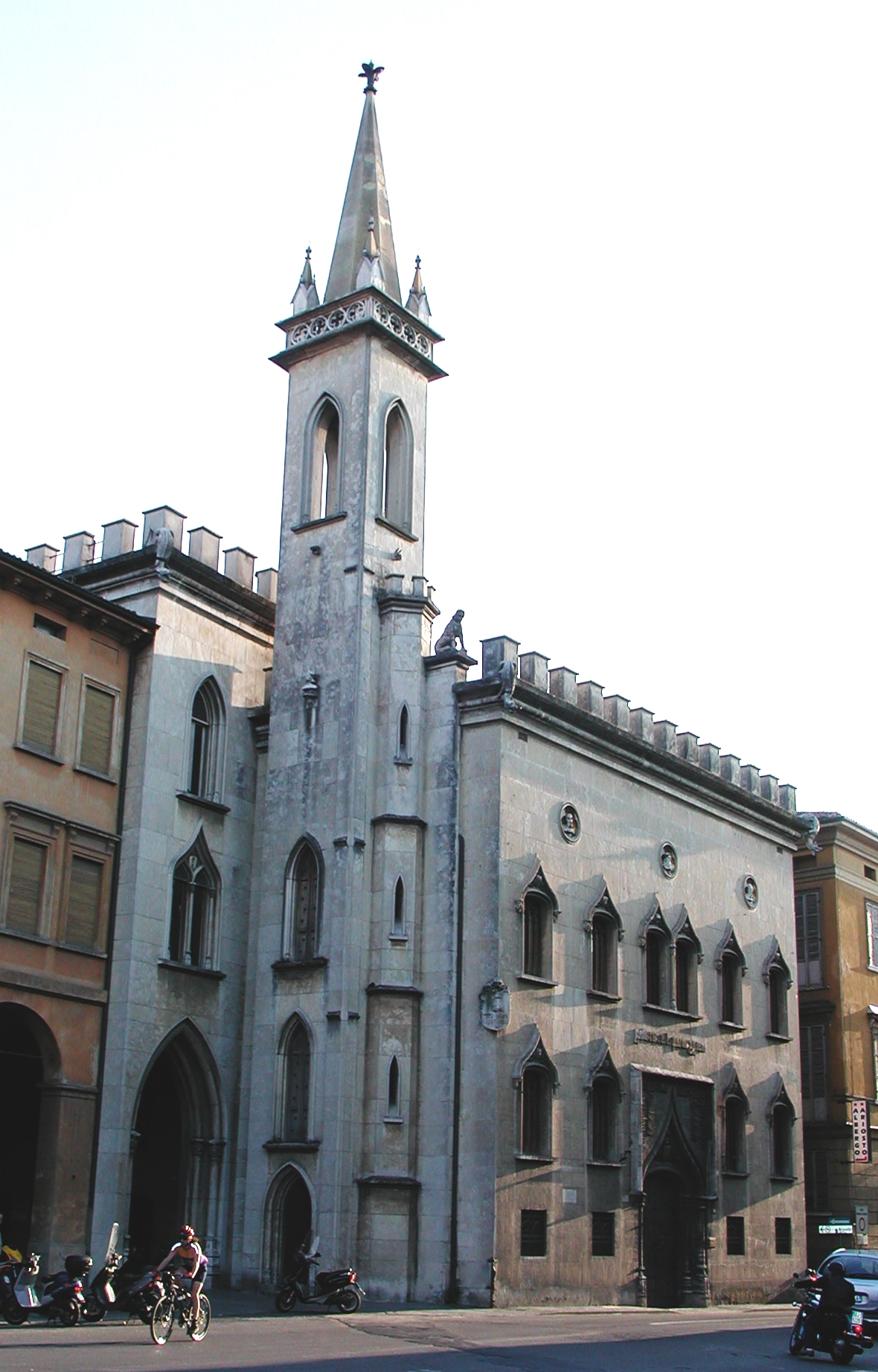 Galleria parmeggiani, Reggio Emilia author:Paolo da Reggio